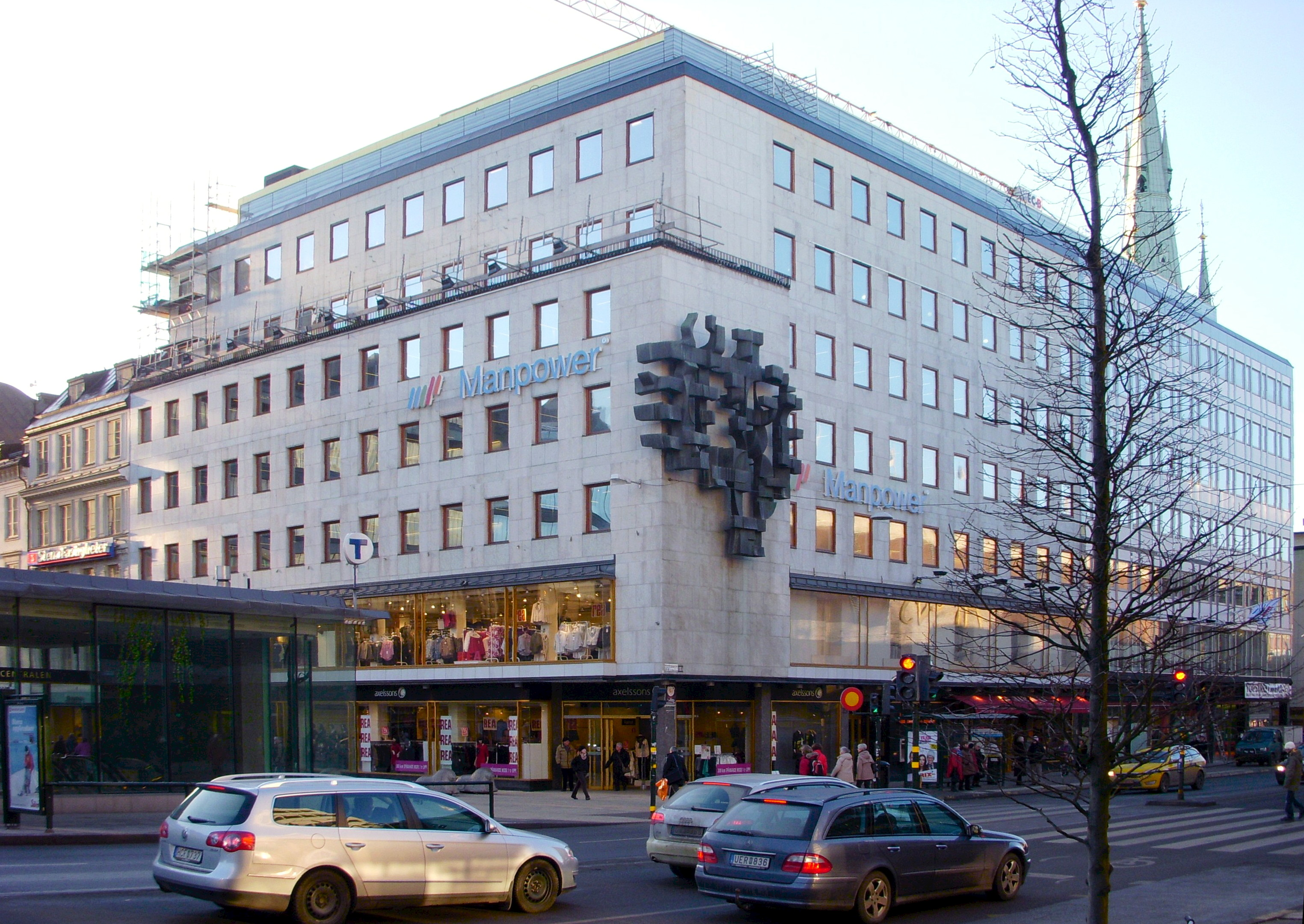 Kontorshus hörnet Drottninggatan/Klarabergsgatan i Stockholm